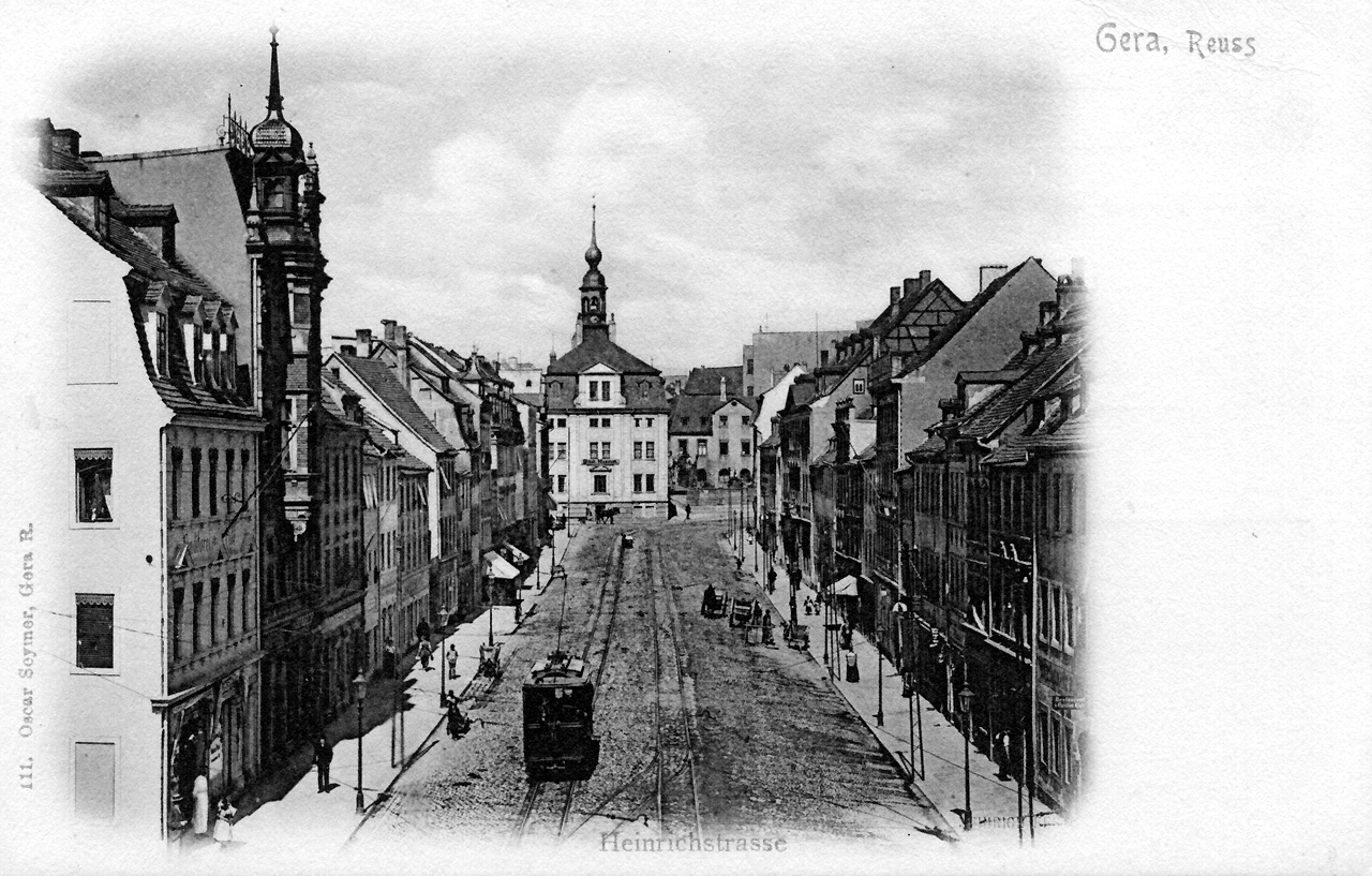 Gera, Heinrichstrasse mit Stadtmuseum und dem 1906 abgerissenen Kollegienhof